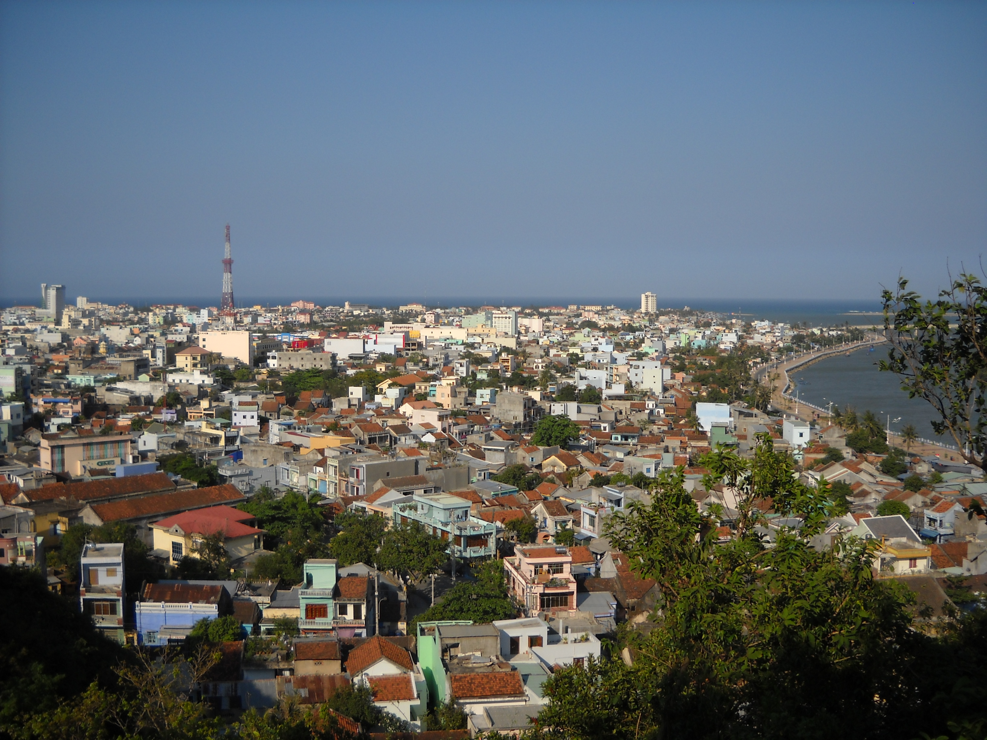 Một góc TP.Tuy Hòa, Phú Yên